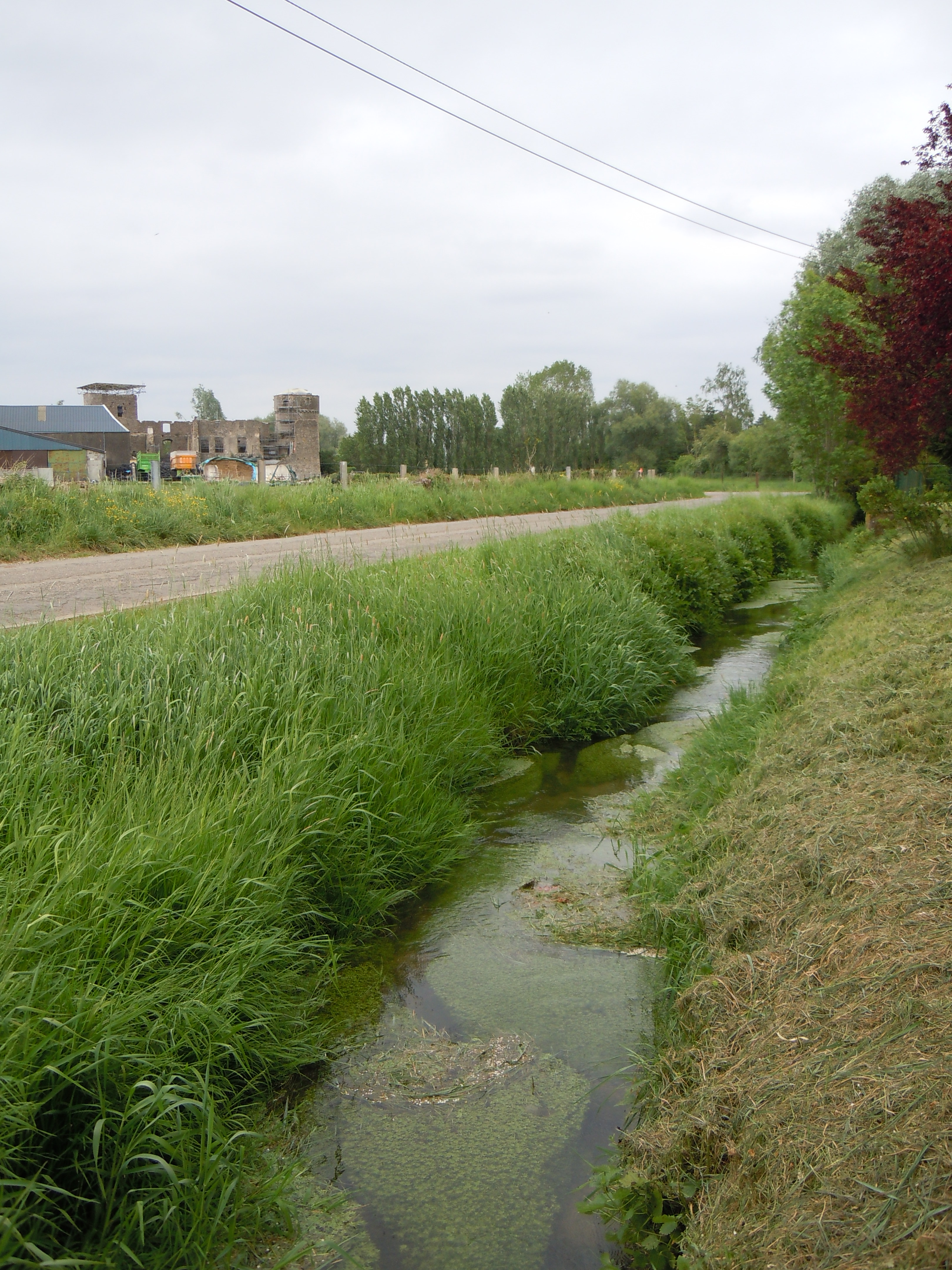 Le ruisseau d'Autelbas à la rue Huart d'Autel à Autelbas-Barnich (Belgique)